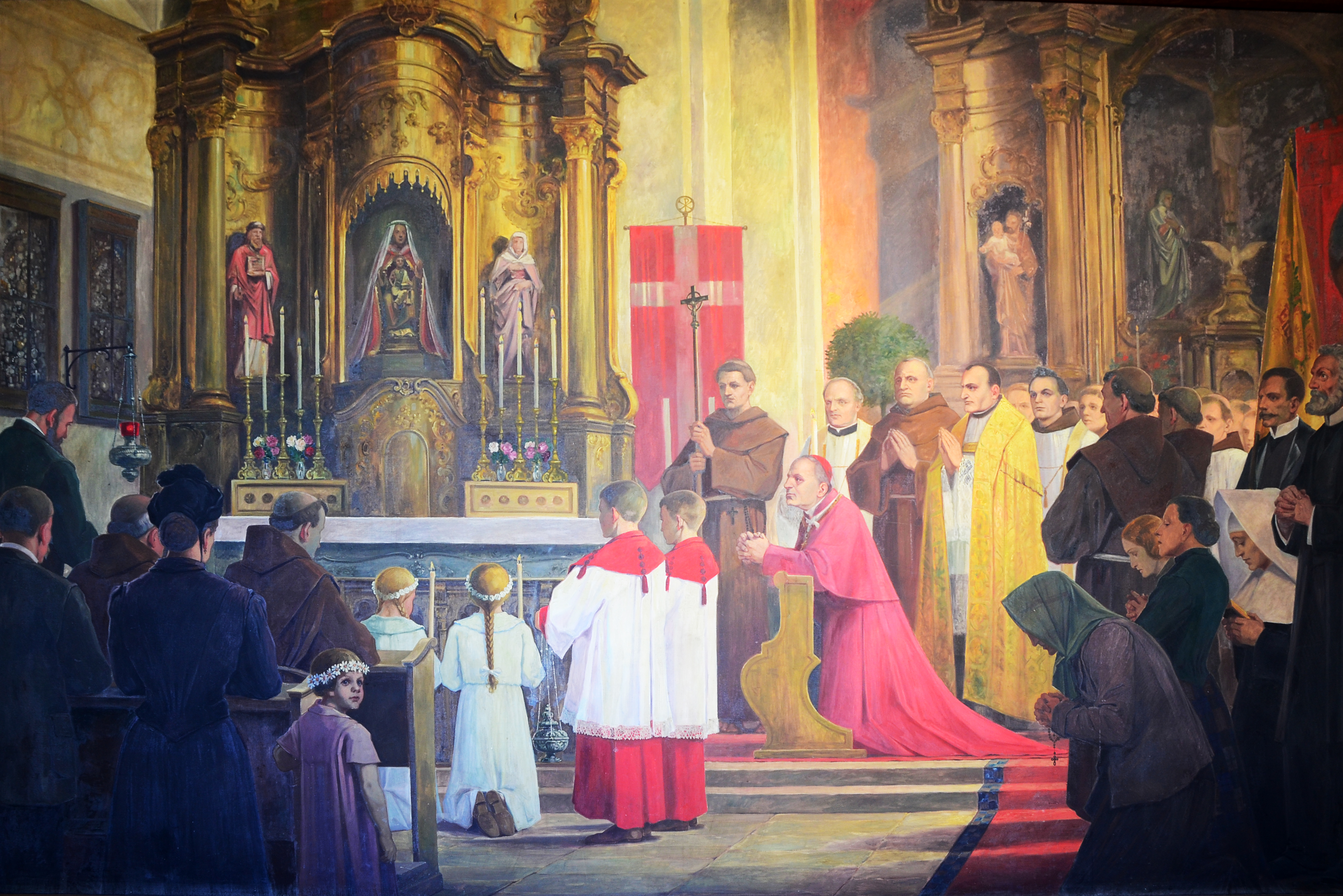 Die 200 Jahrfeier der Wallfahrt in Werl wird 1861 festlich begangen. An diesem Fest beteiligte sich auch der Bekennerbischof Konrad Martin von Paderborn in der alten Wallfahrtskirche.